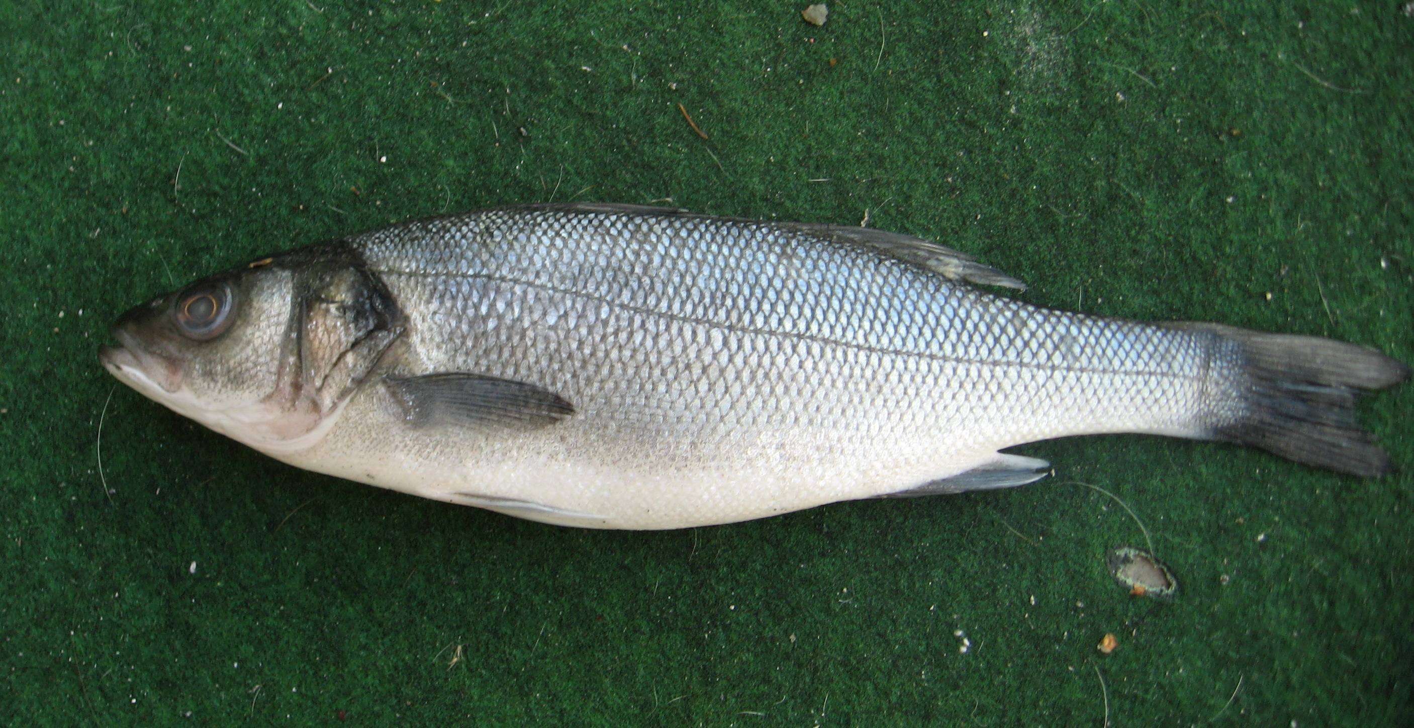 Mořčák evropský Dicentrarchus labrax